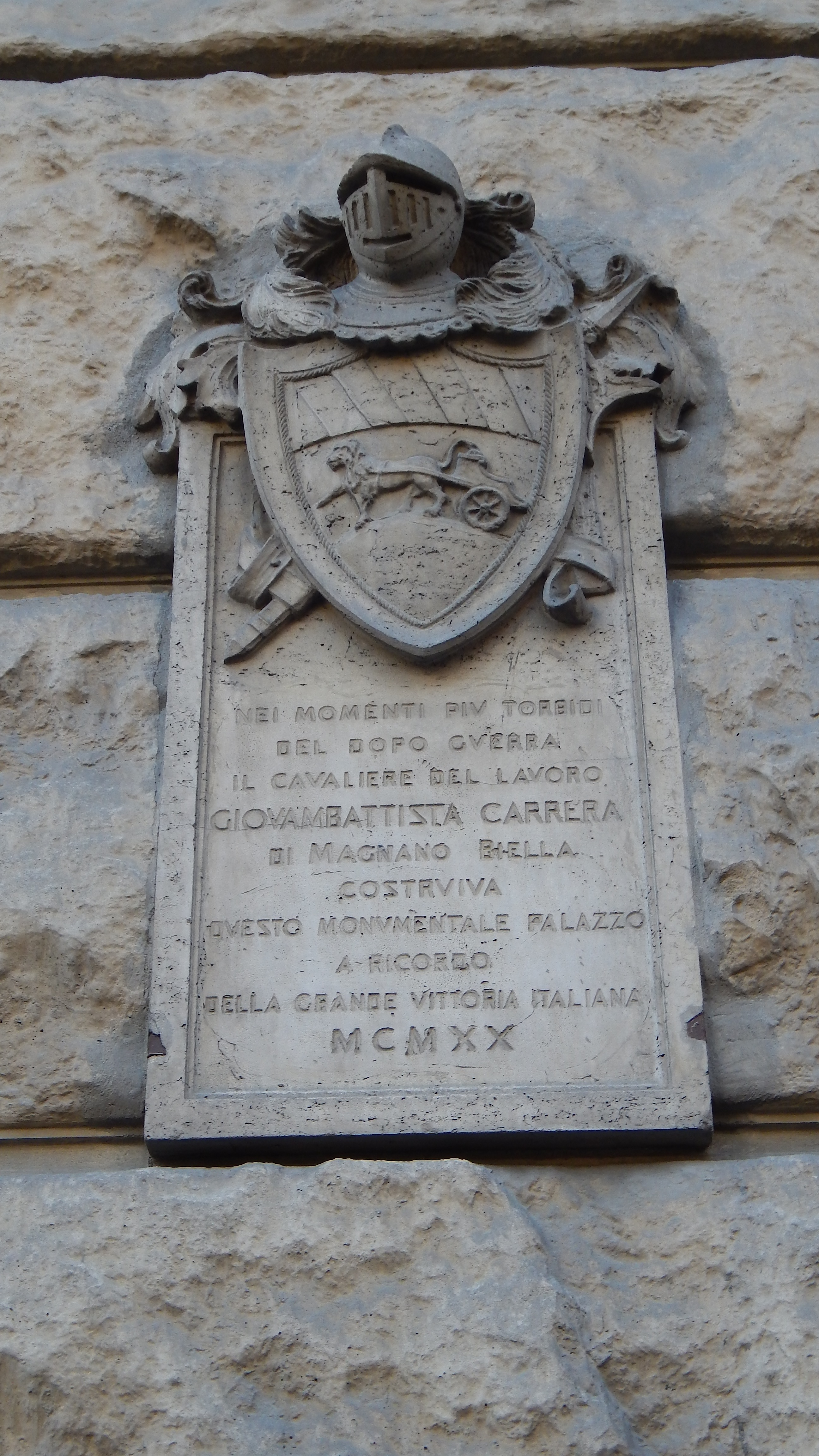 Una veduta della Casa della Vittoria (Torino)